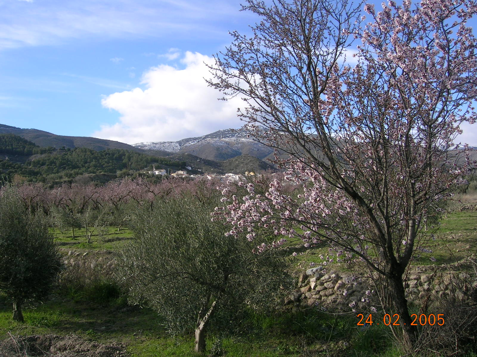 fotos de Suflí (Almería, España) Material propio Febrero 2005 Jesus martinez marin Material propio que lo pongo a disposicion de todo el mundo.